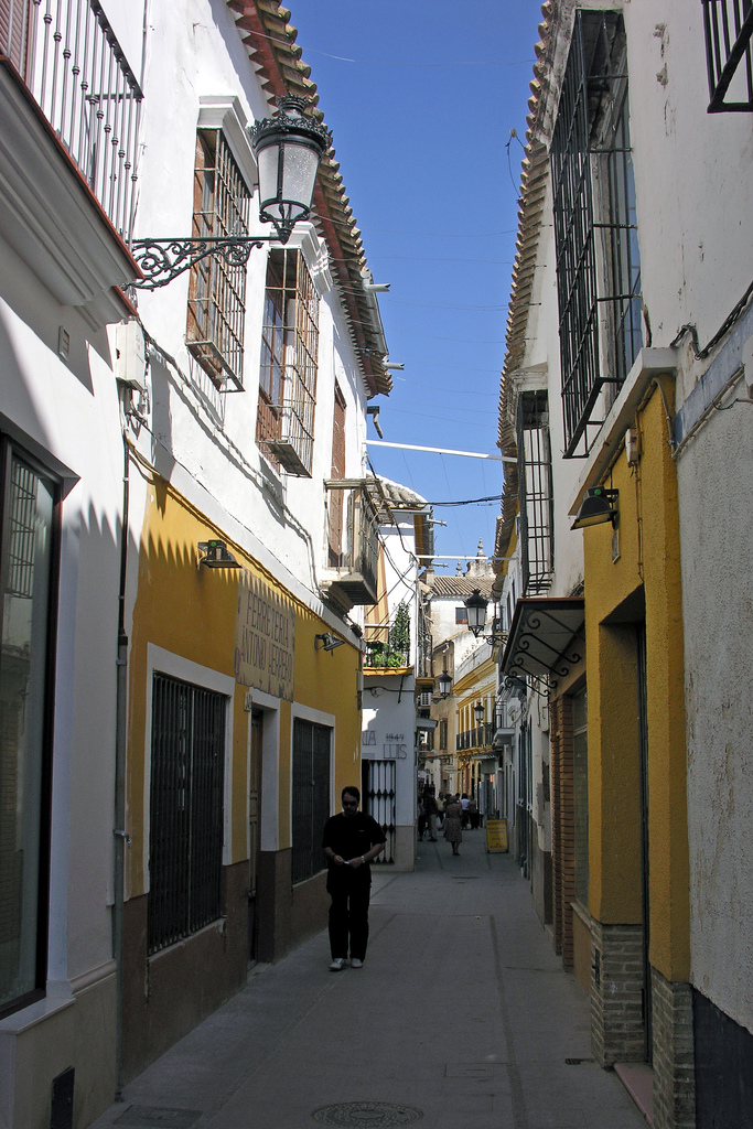 Calle de Ecija, Sevilla, Andalucía, España